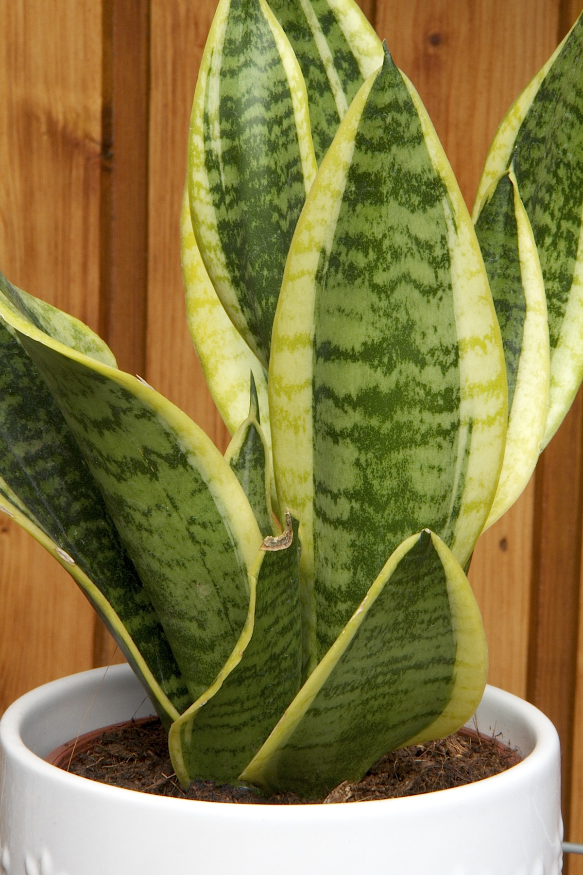 Sansevieria trifasciata 'Futura Simplex'